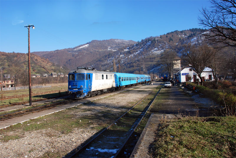 Regionalzug mit Lok 60-0765-2 im Bahnhof von Valea Vişeului